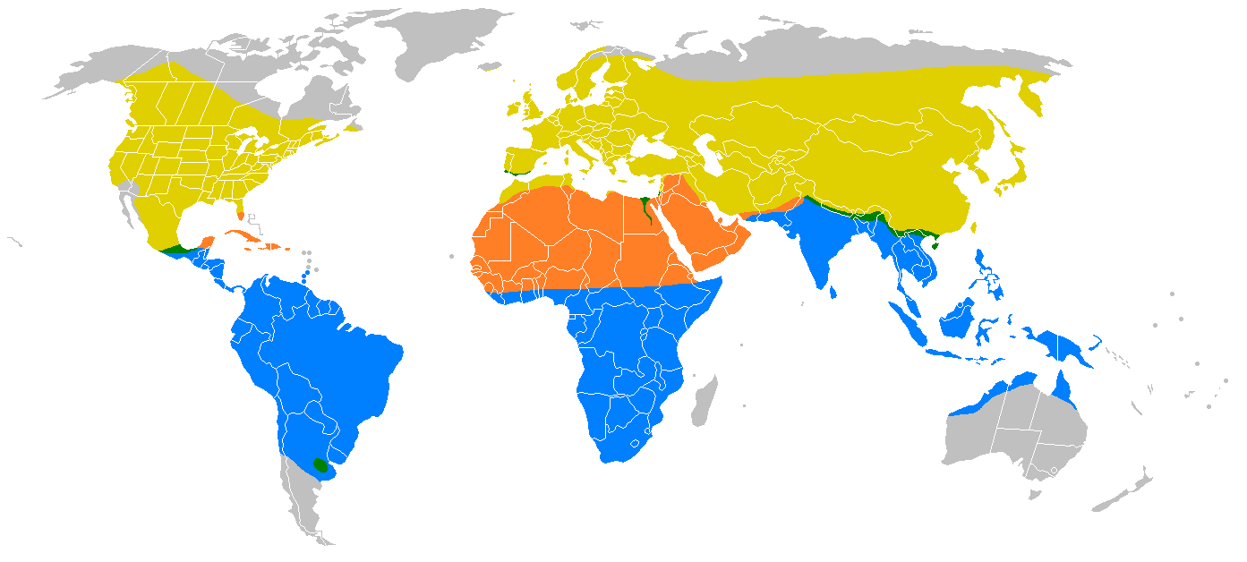 Verspreidingsgebied Hirundo rustica